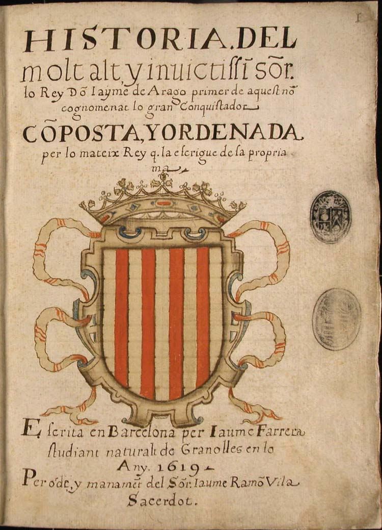 Libre dels Feyts.